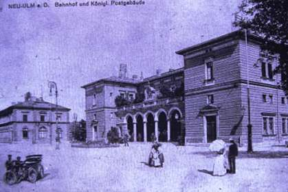 Bild des Bahnhofs Neu-Ulm von 1910 auf einer Postkarte